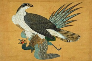 hawk seizing a pheasant by go-Yozei